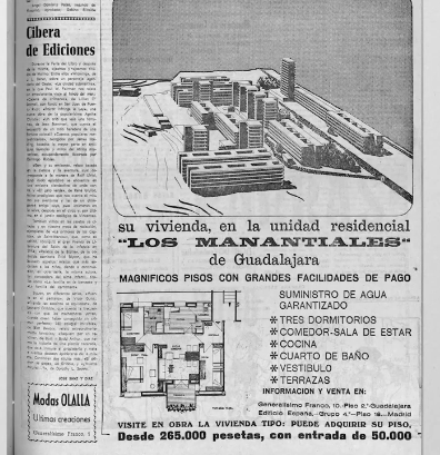 Archivo acerca del origen del barrio de Los Manantiales (Guadalajara)